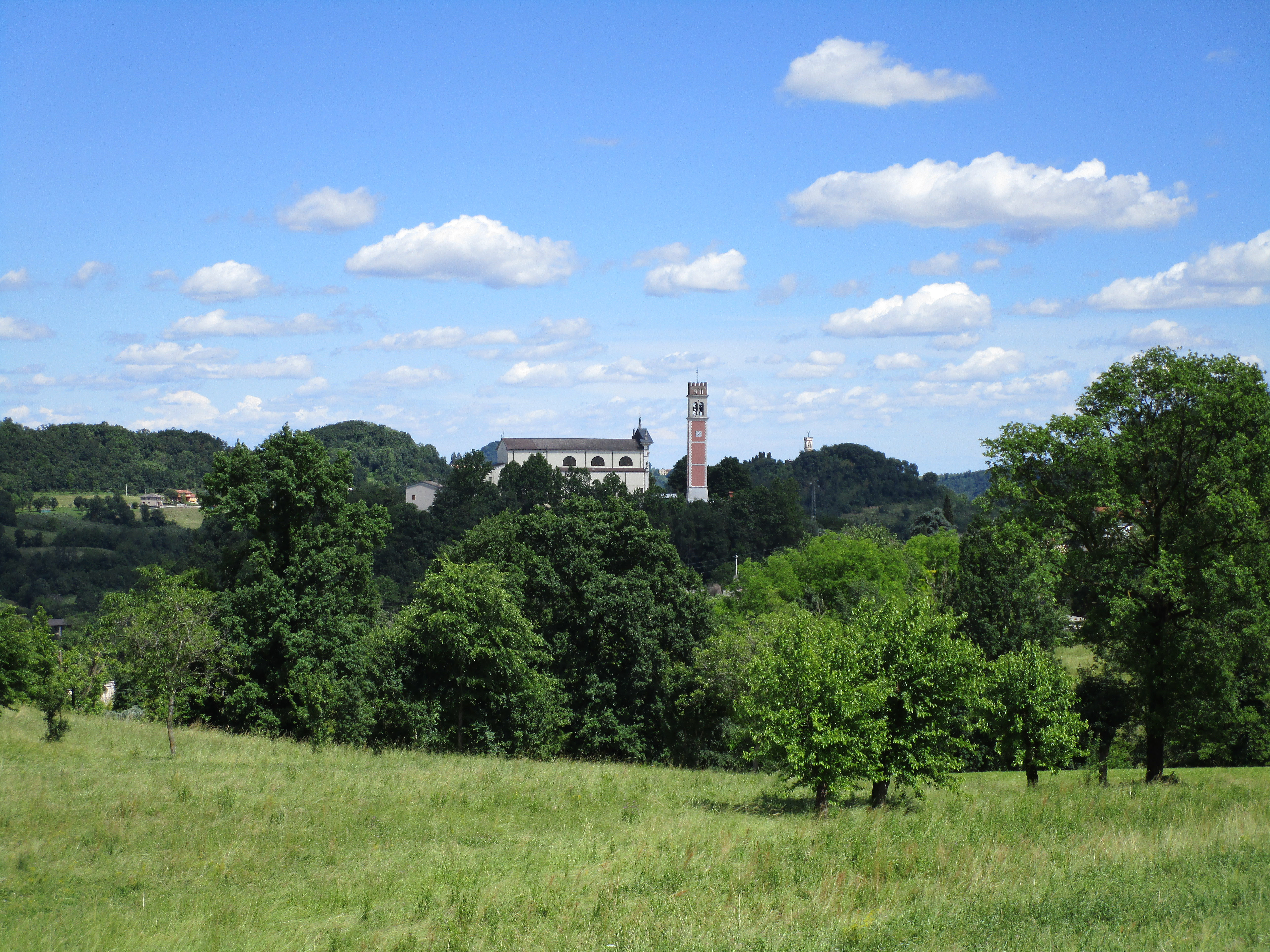 Lovara di Trissino vista da Via Marzotti.L